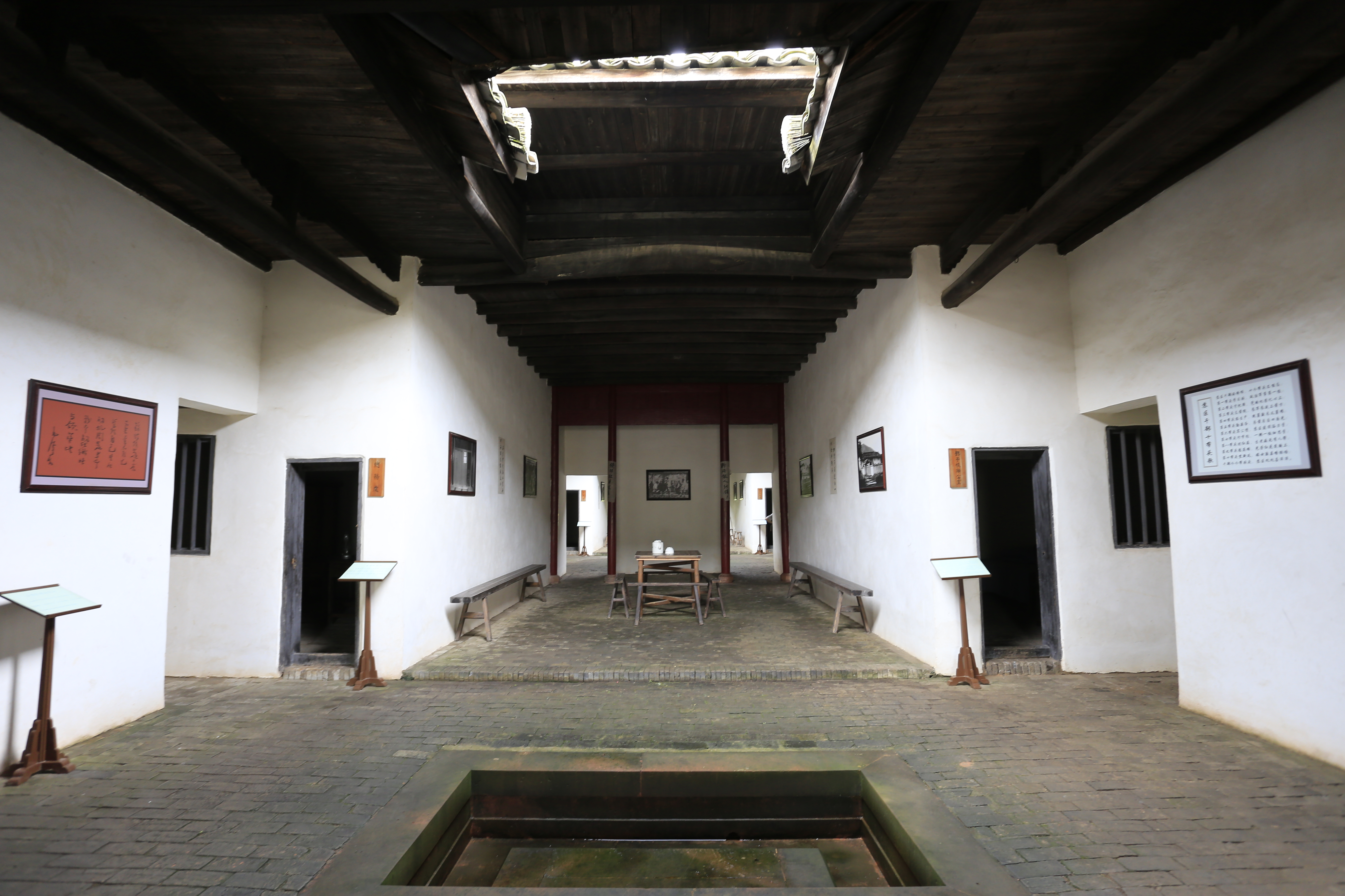 瑞金沙洲坝革命旧址—— 中华苏维埃共和国财政人民委员部旧址